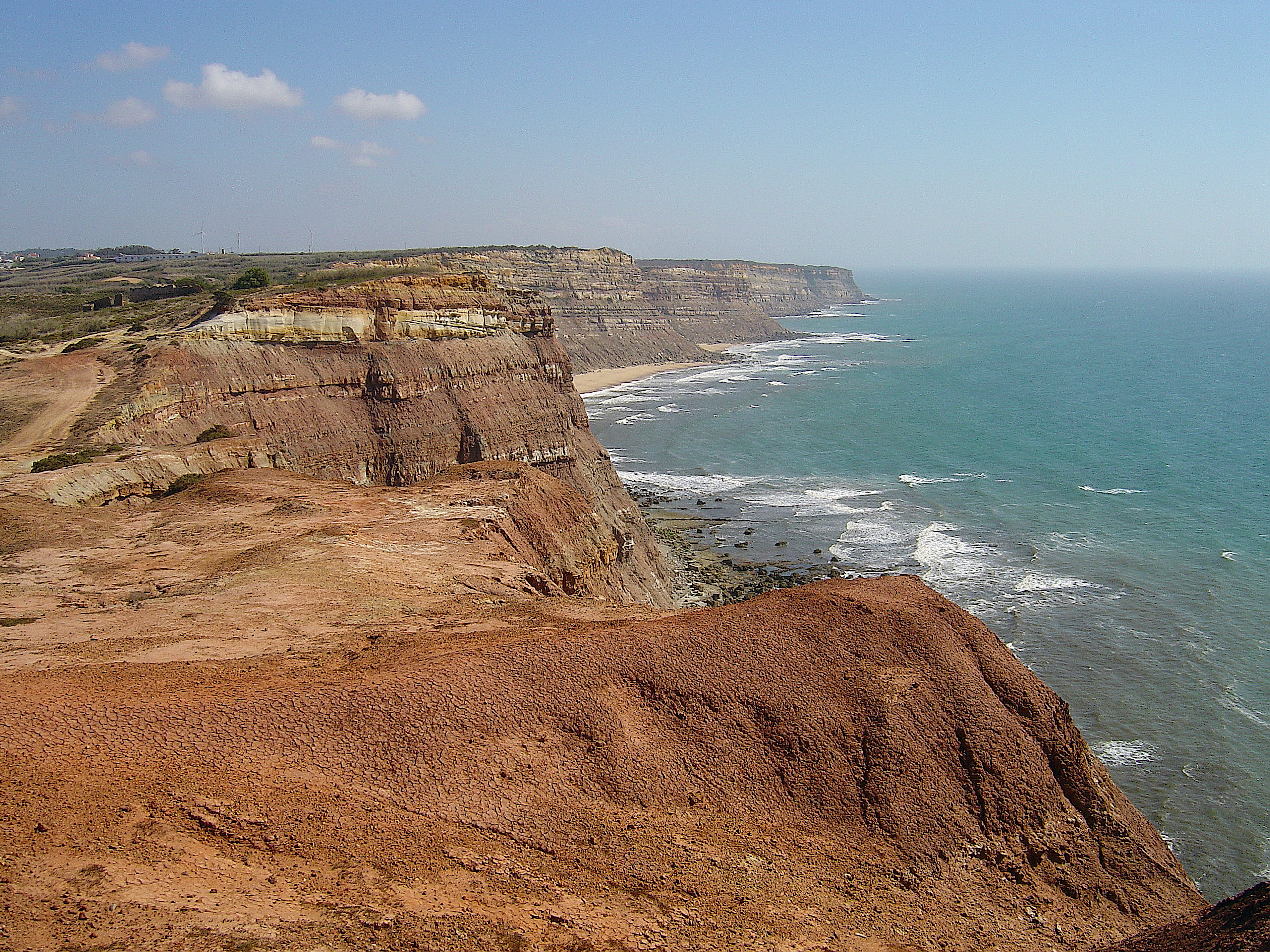 Litoral entre as Praias da Calada e da Assenta ( Portugal )